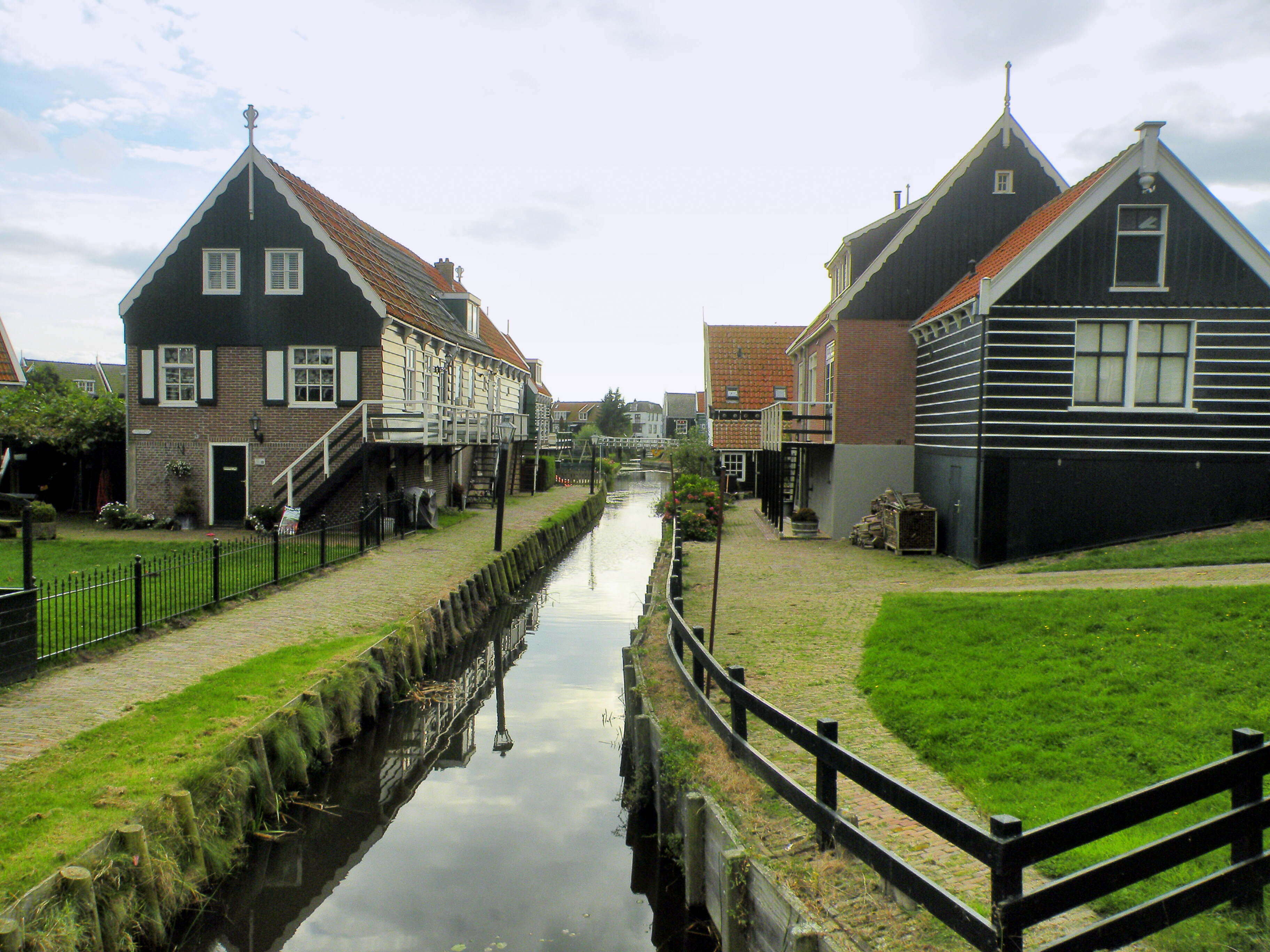 Marken, Havenbuurt 8 (links voor) RM. 28193